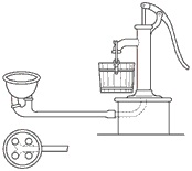 een melkmachine uit 1880